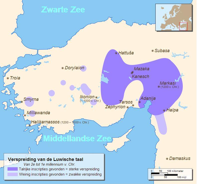 Luvisch verspreidingsgebied Eigen bewerking van nl::Afbeelding:Luwian_Language_de.svg (van Commons) door Ben Pirard en Hendrik Tammen februari 2007